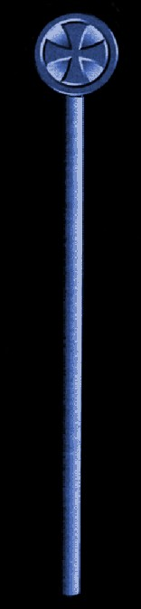 Abakusstab, Insigium des Großmeisters des Templerordens